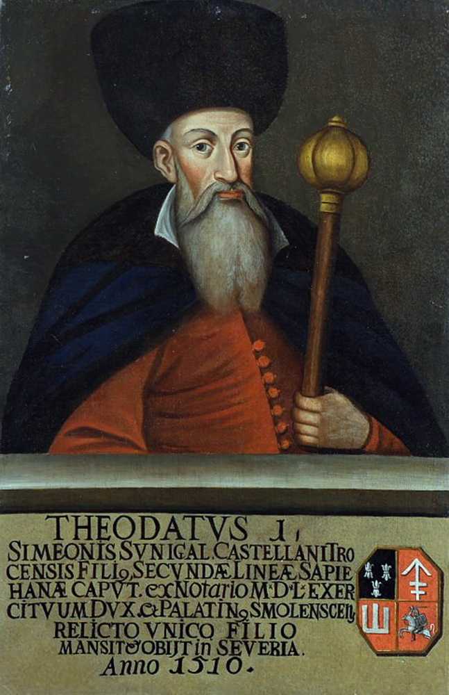 Беларуская (тарашкевіца): Партрэт Багдана Сапегі (Bahdan Sapieha)